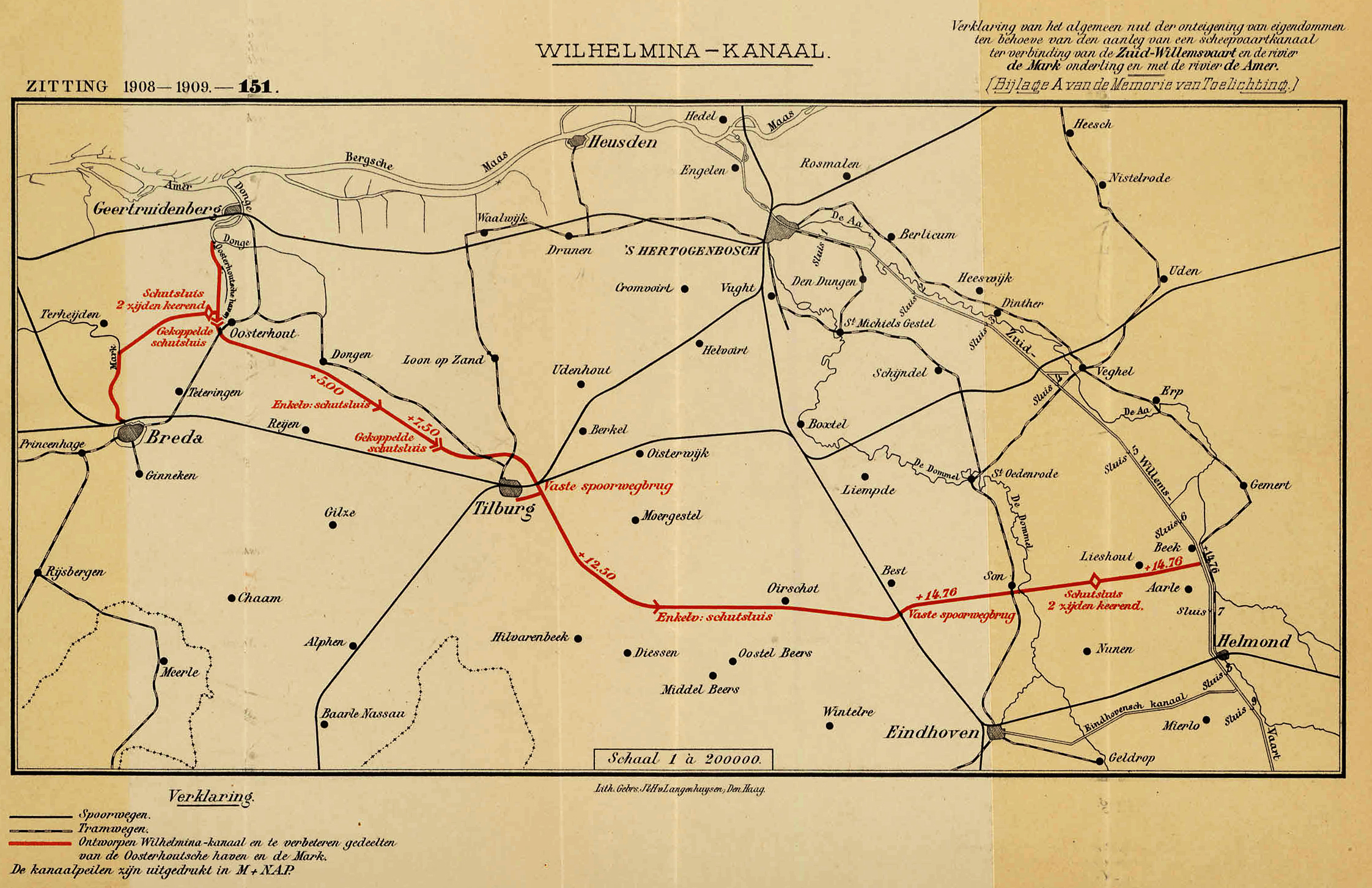 Op de kaart zijn de diverse benodigde civieltechnische werken en de kanaalpeilen afgebeeld